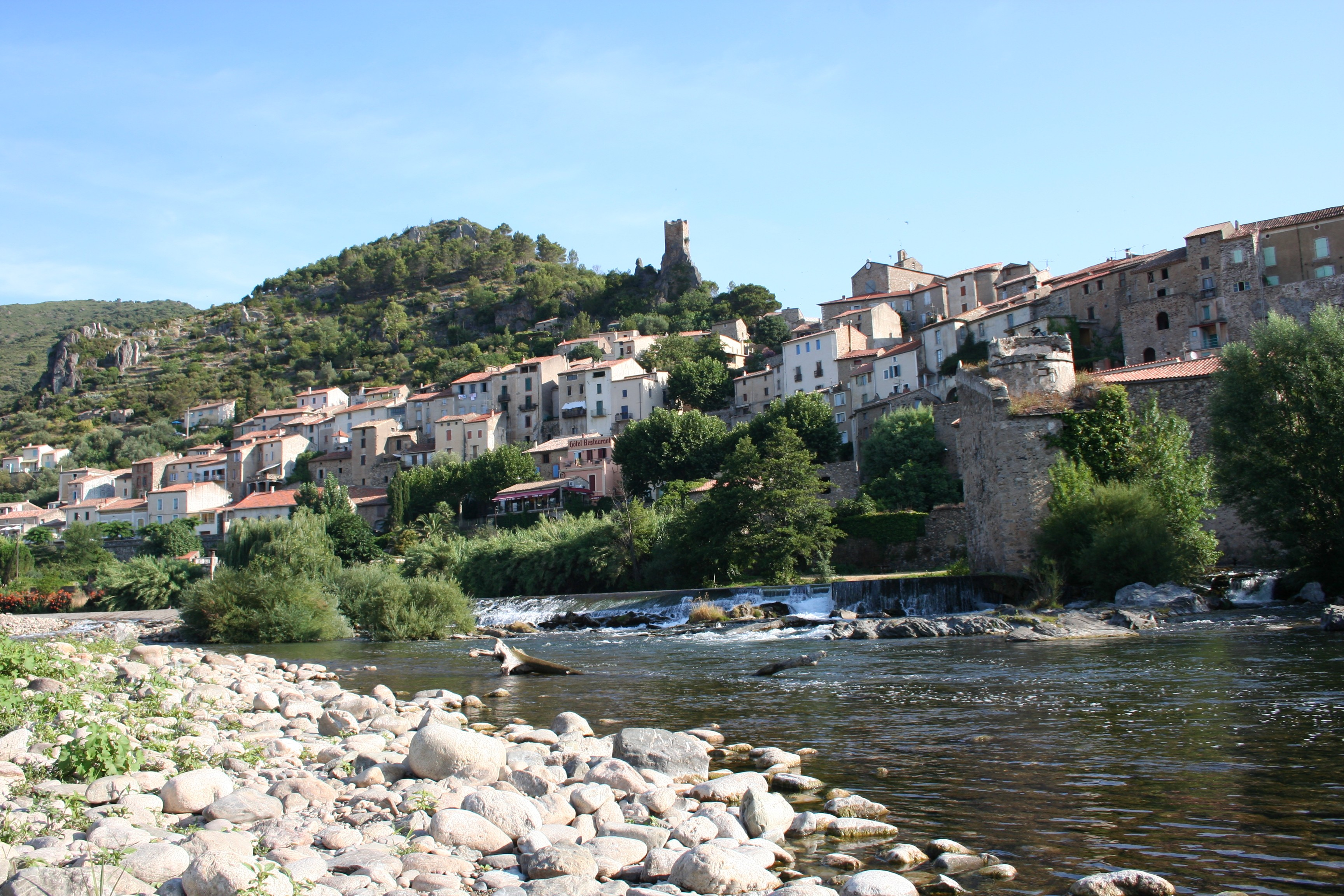 Roquebrun, vue d'ensemble, photographie prise sur la plage, Hérault, France.